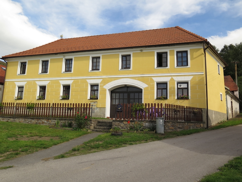 Venkovská usedlost, Vodice 6, Vodice (Lhenice).